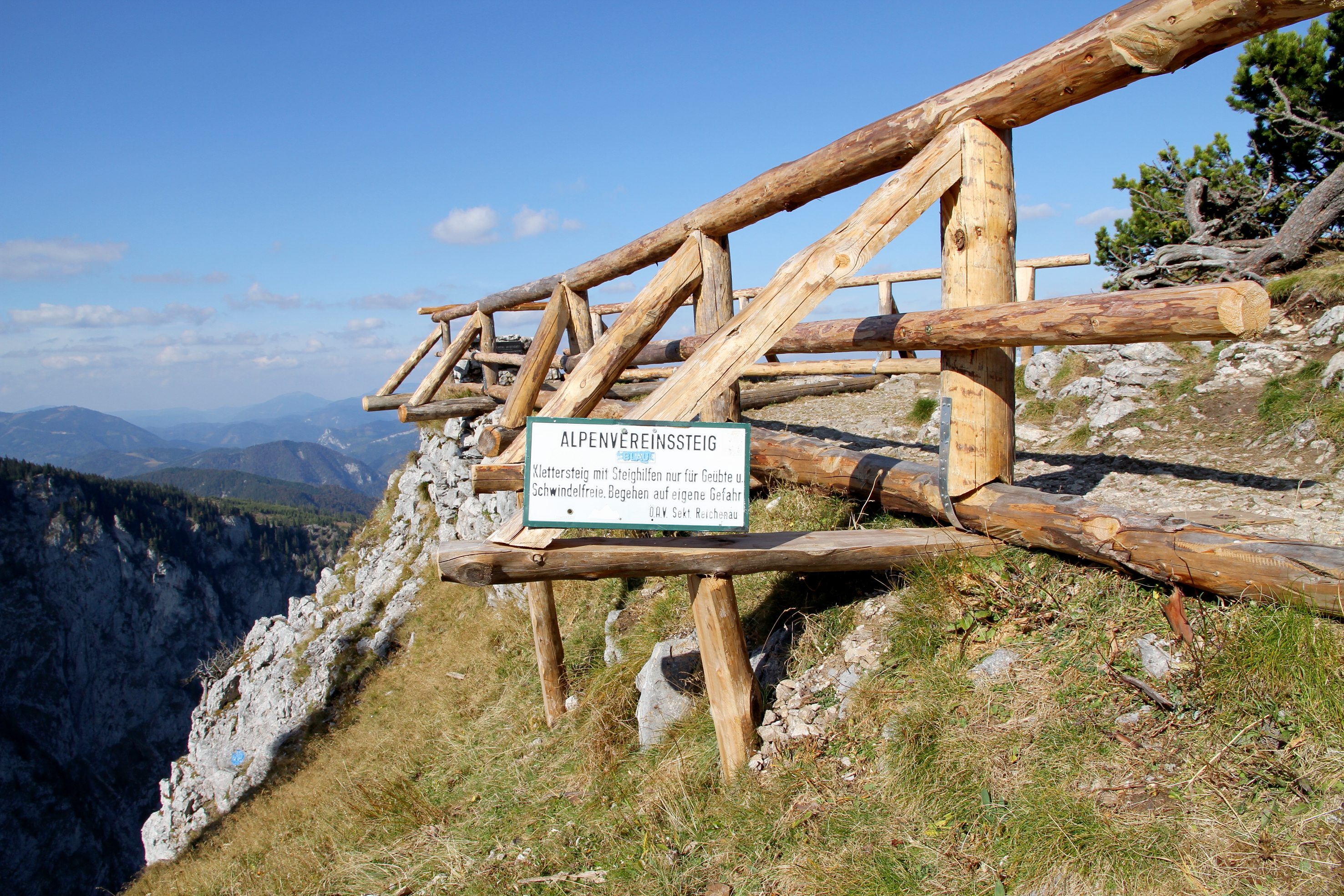 Neben der Höllentalaussicht ist die Ausstiegs- beziehungsweise Einstiegstafel des Alpenvereinssteiges angebracht, der vom Großen Höllental auf das Raxmassiv führt.